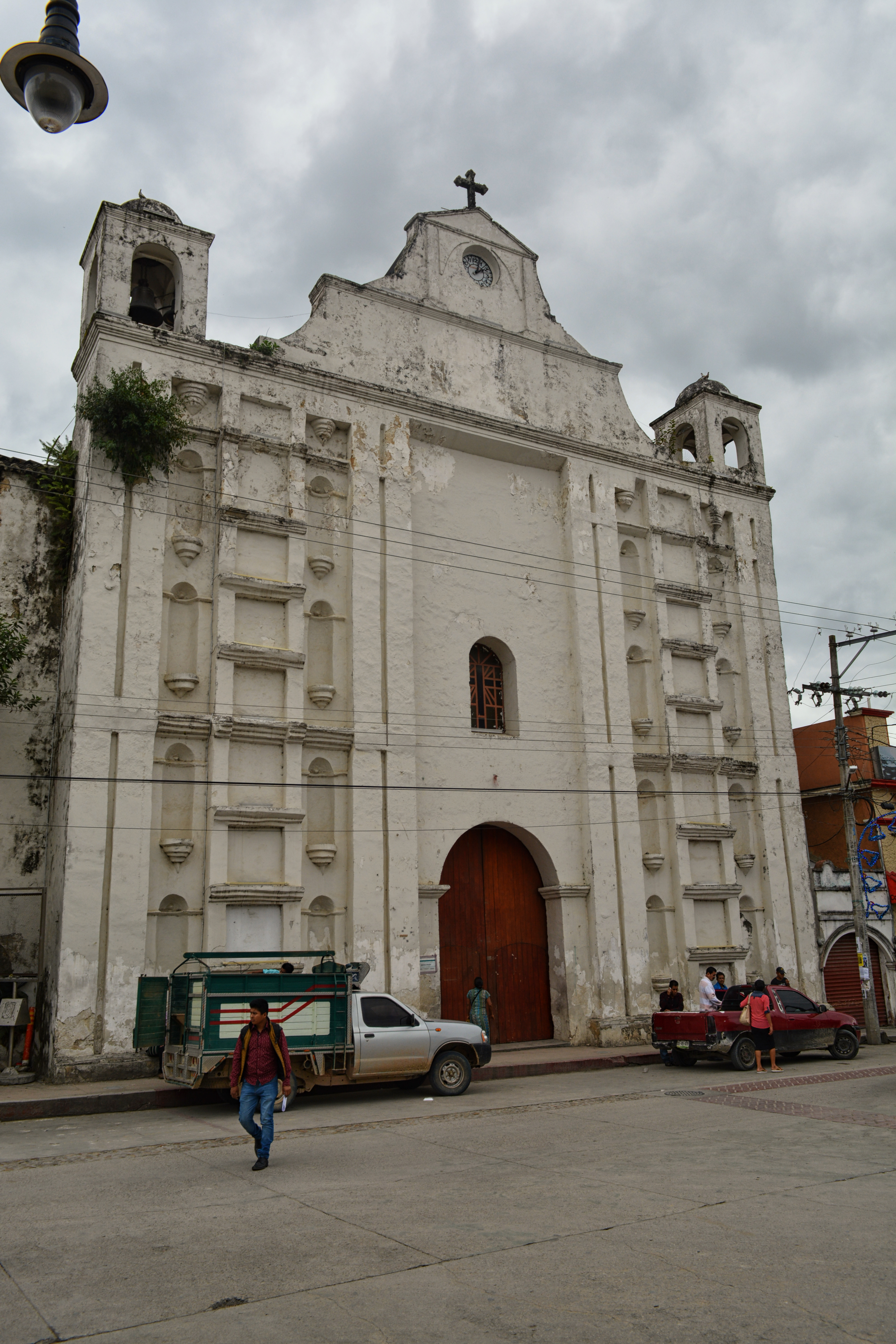 Iglesia San Jacinto de Polonia. Ocosingo, Chiapas.